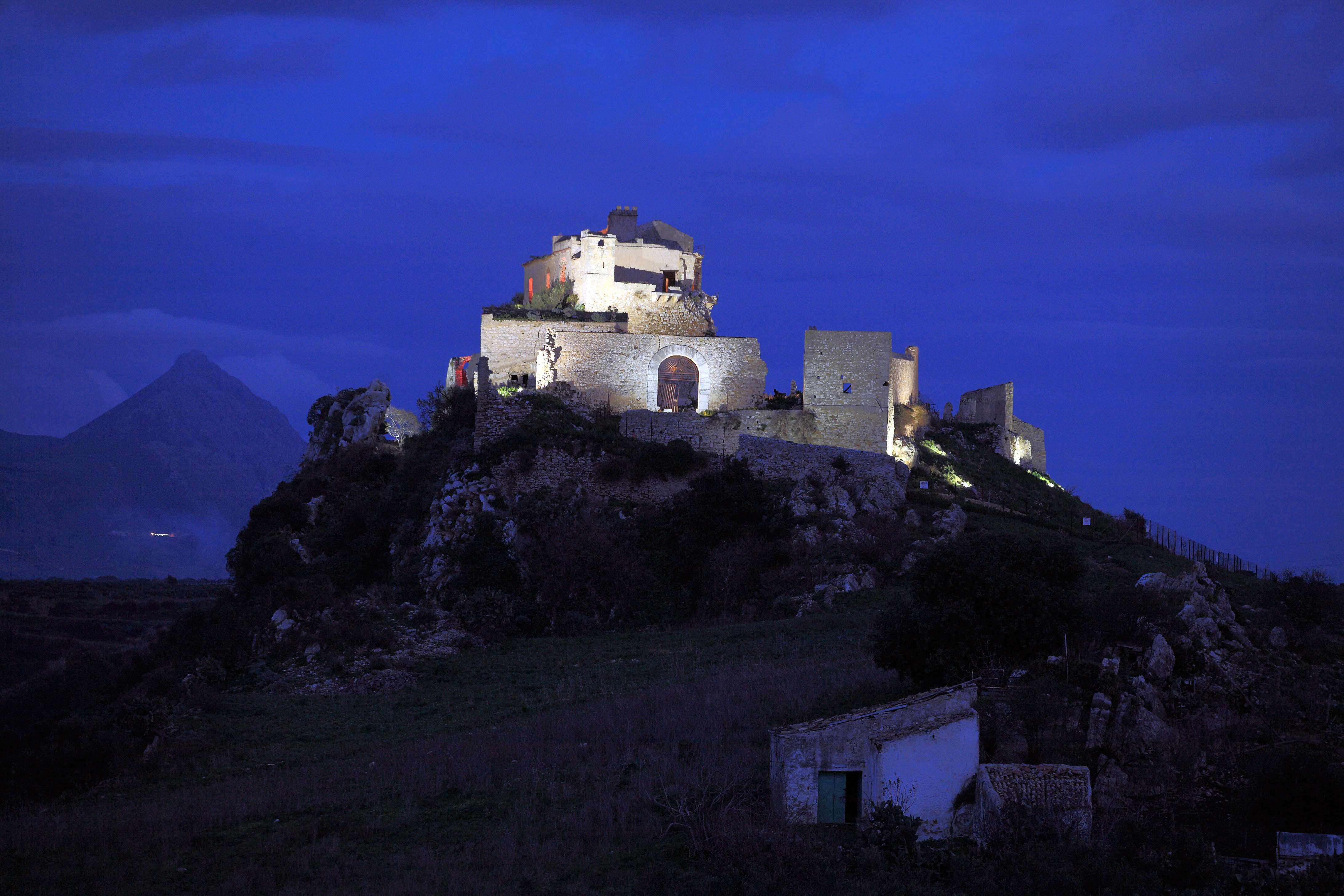 Castello di Calatubo Adagiato su una rupe a tre chilometri da Alcamo, notturno.